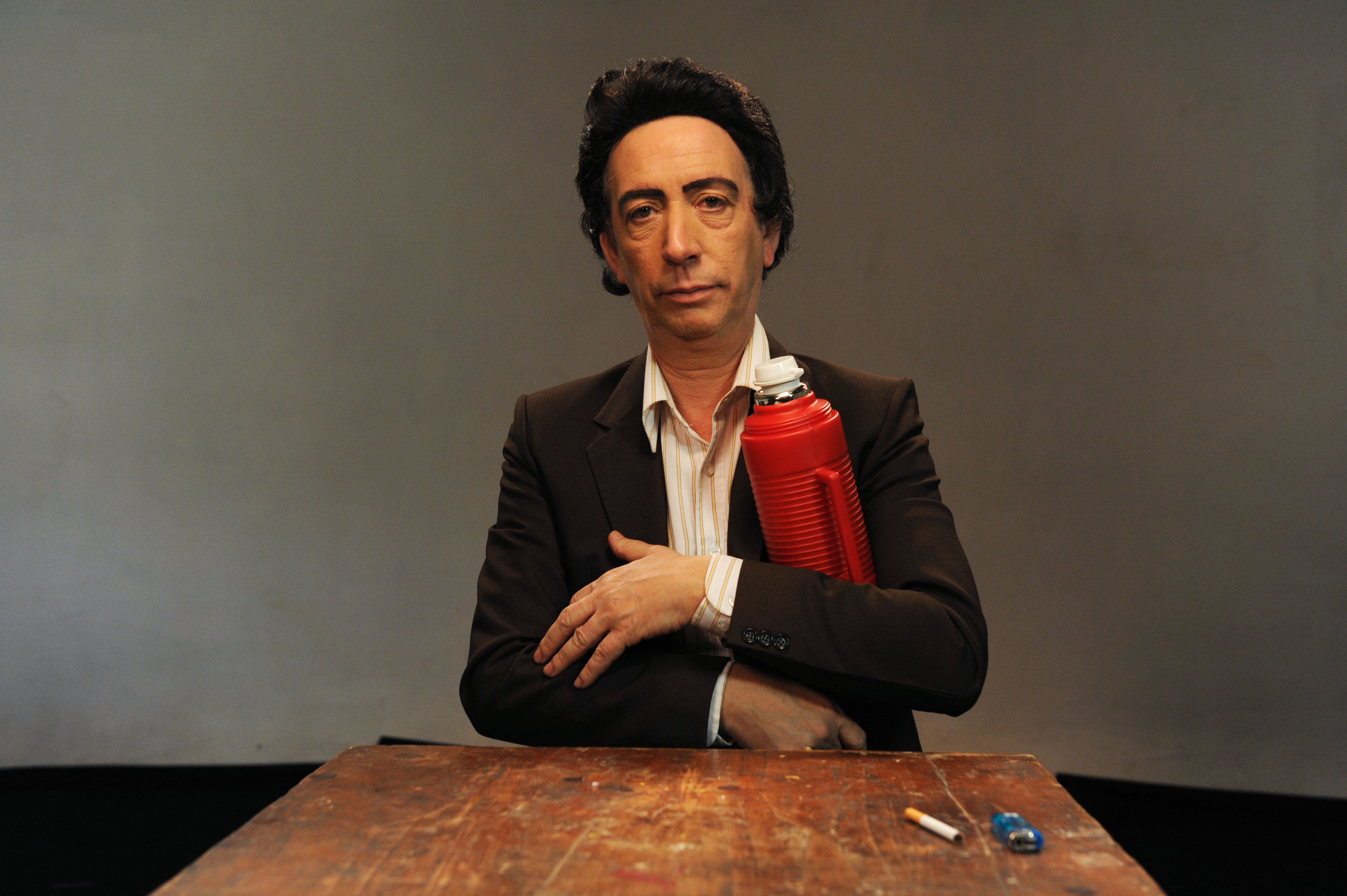 Novena temporada. Foto TVP 2014.